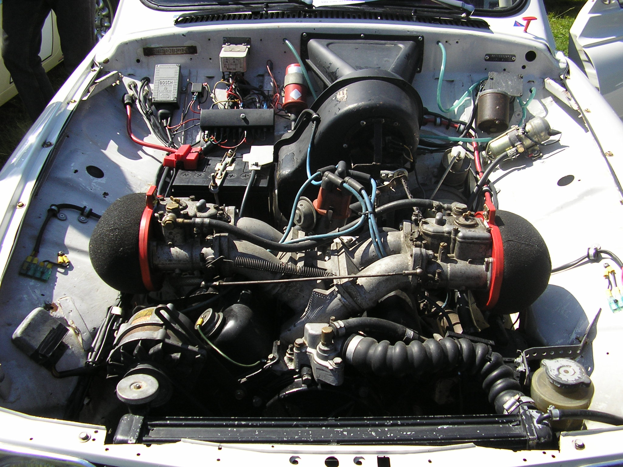 SAAB 96 V4 engine (tuned)